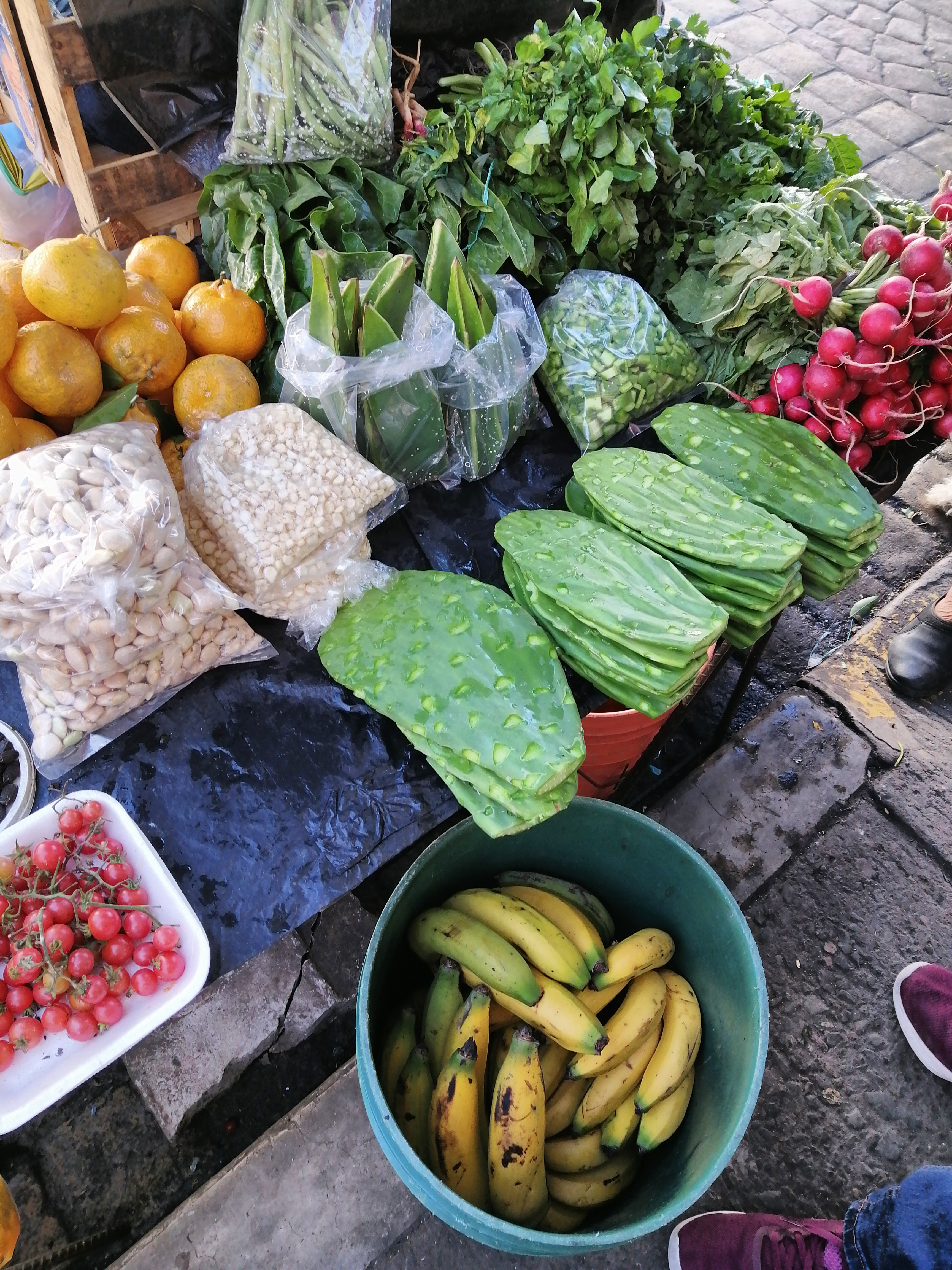 NOpales, platanos, rabanos, crucetas, maiz, naranjas.